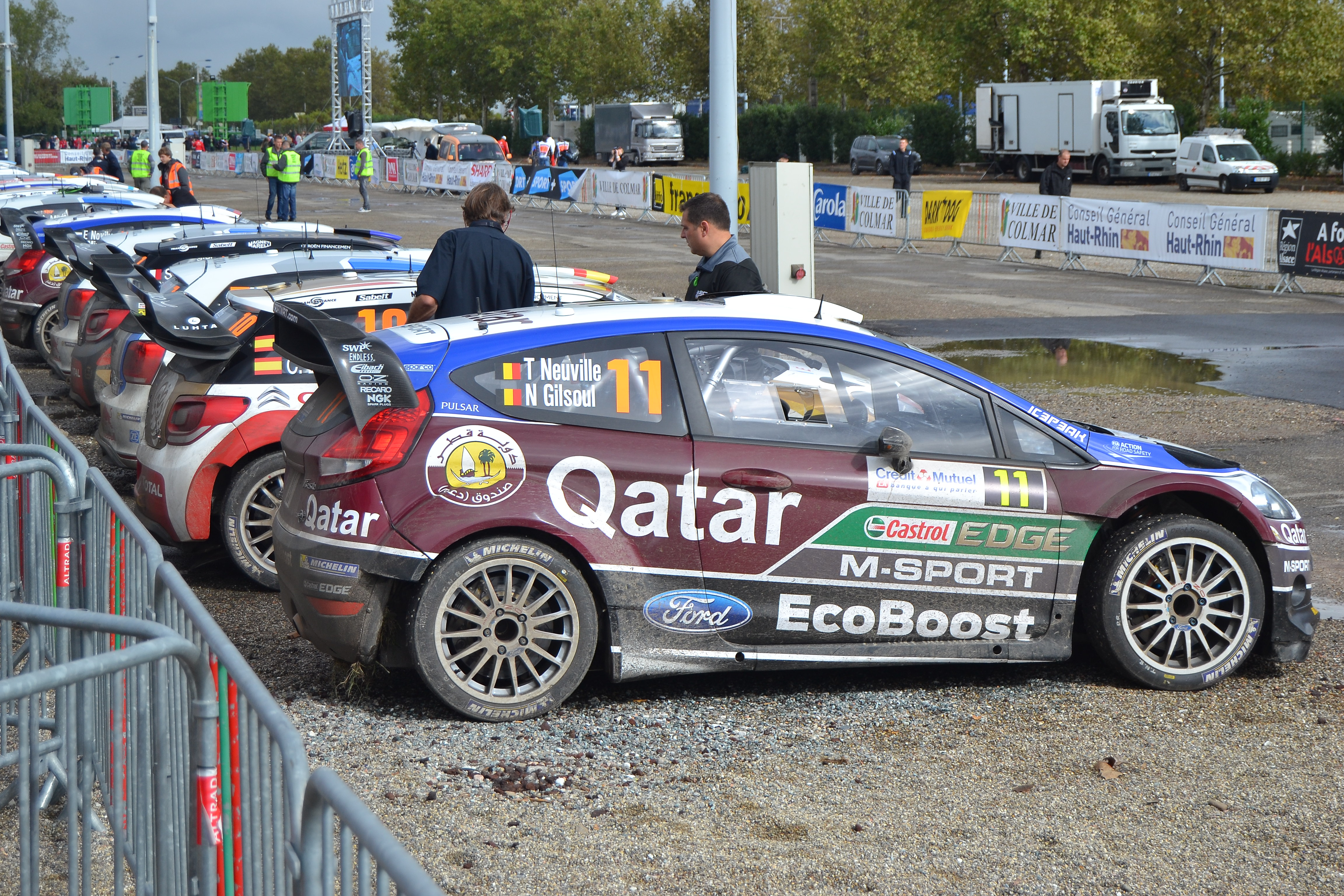 Thierry Neuville au parc d'assistance de Colmar durant le Rallye de France-Alsace 2013.